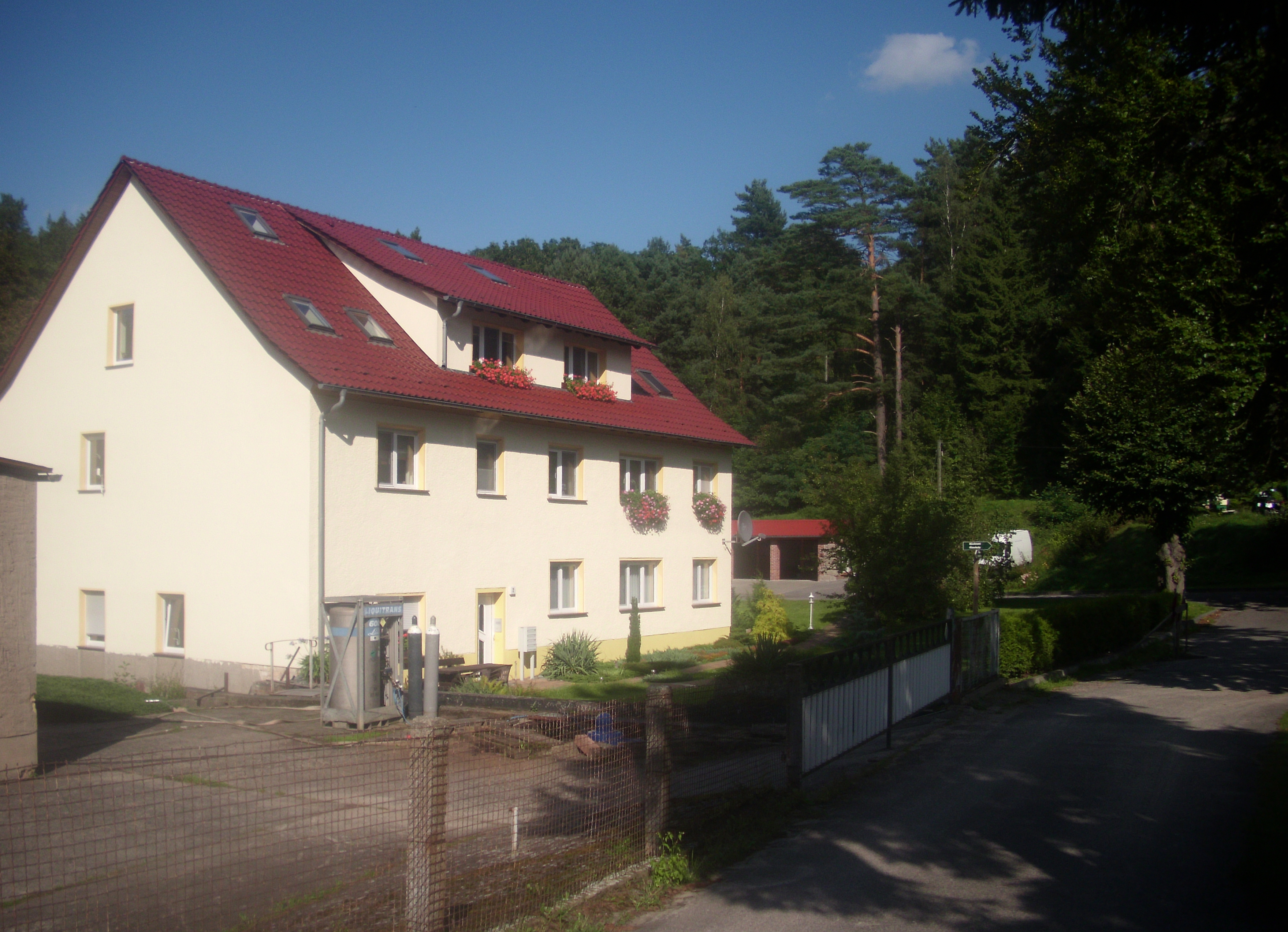 Kieselwitzer Mühle, heute Wohngebäude, Schlaubetal